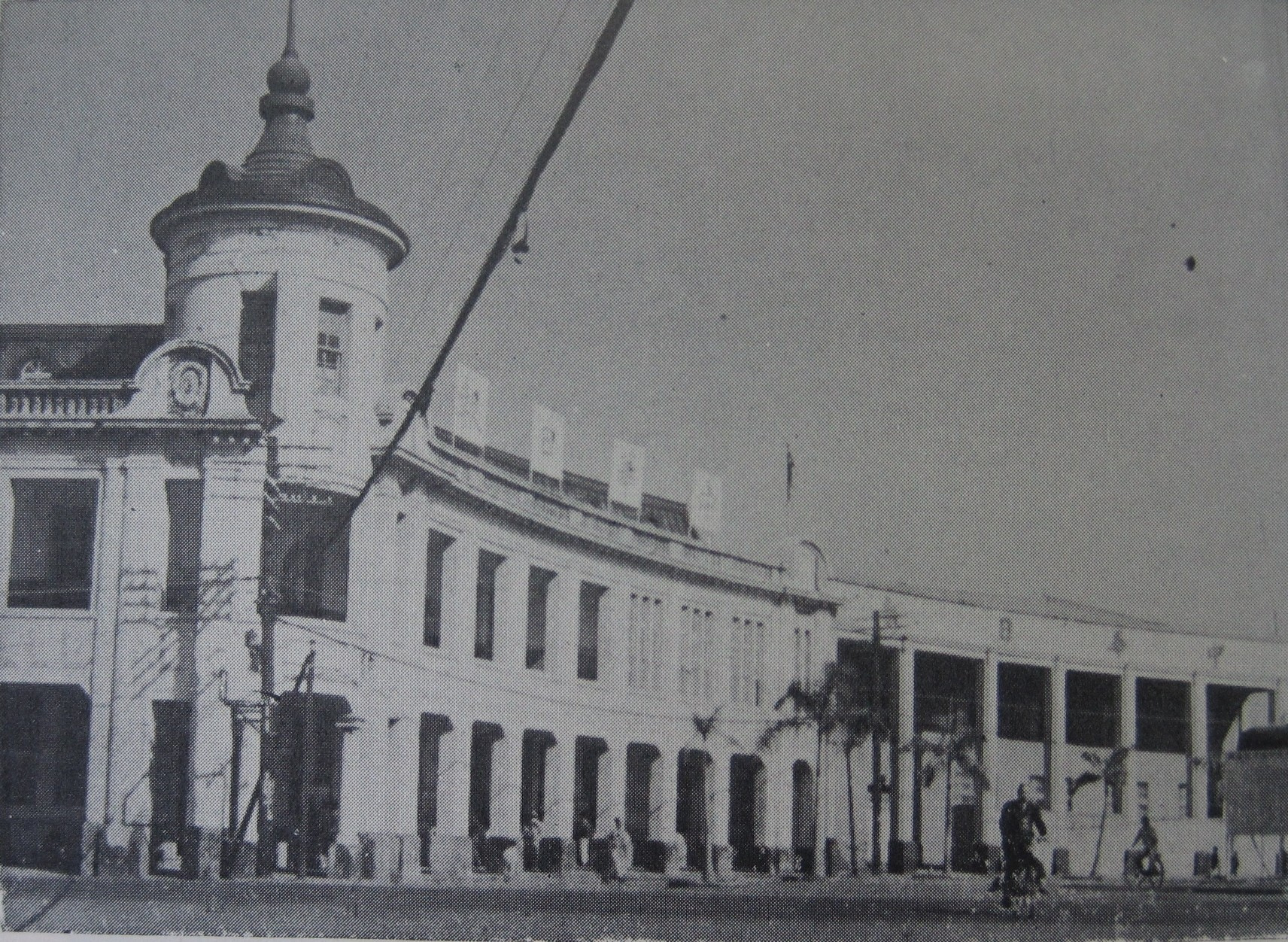 中華日報初代總部，該建築在日治時期曾是勸業銀行臺南支店